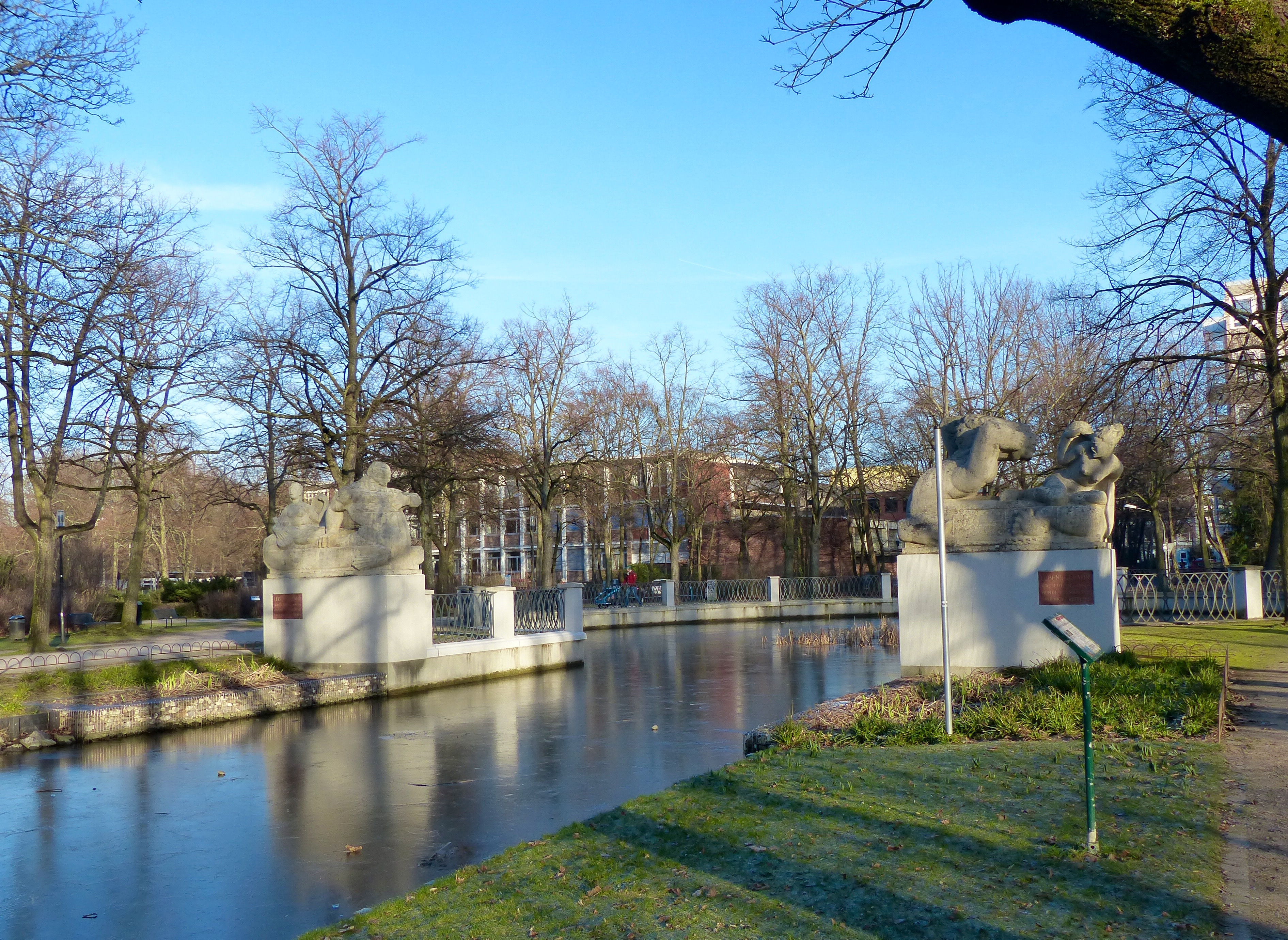 Rautenstrauchkanal in Köln-Lindenthal: "Kentaur und Najade“ Eduard Schmitz (1930)